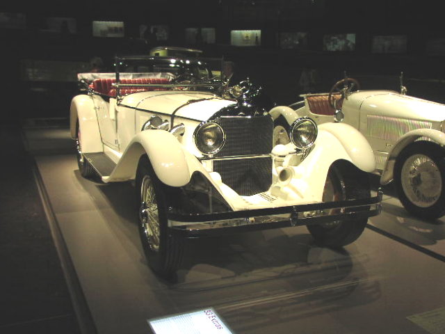 Mercedes-Benz 27/170/225 hp SSK-Type 1928